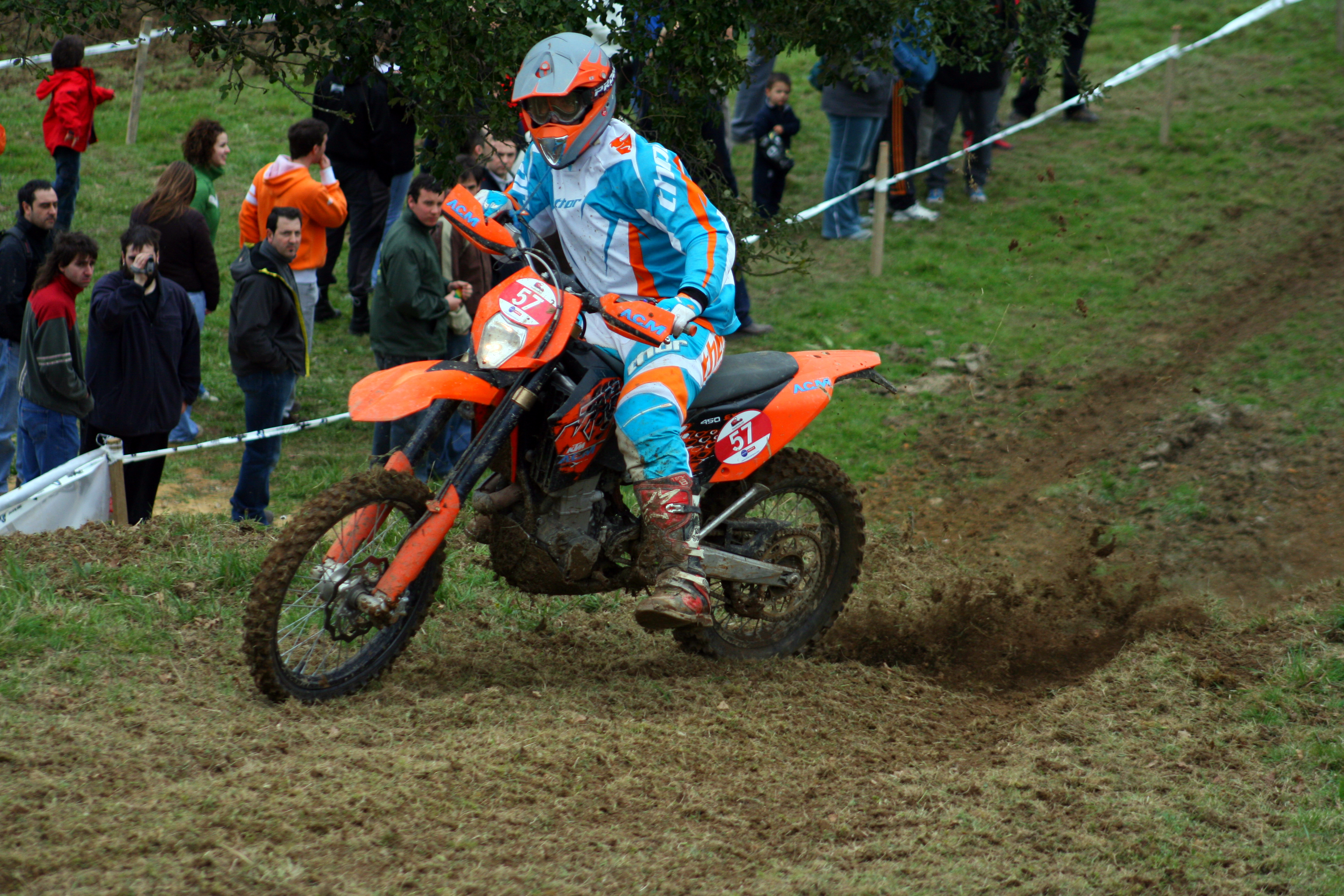 Ejemplo de una moto de Enduro de cuatro tiempos.